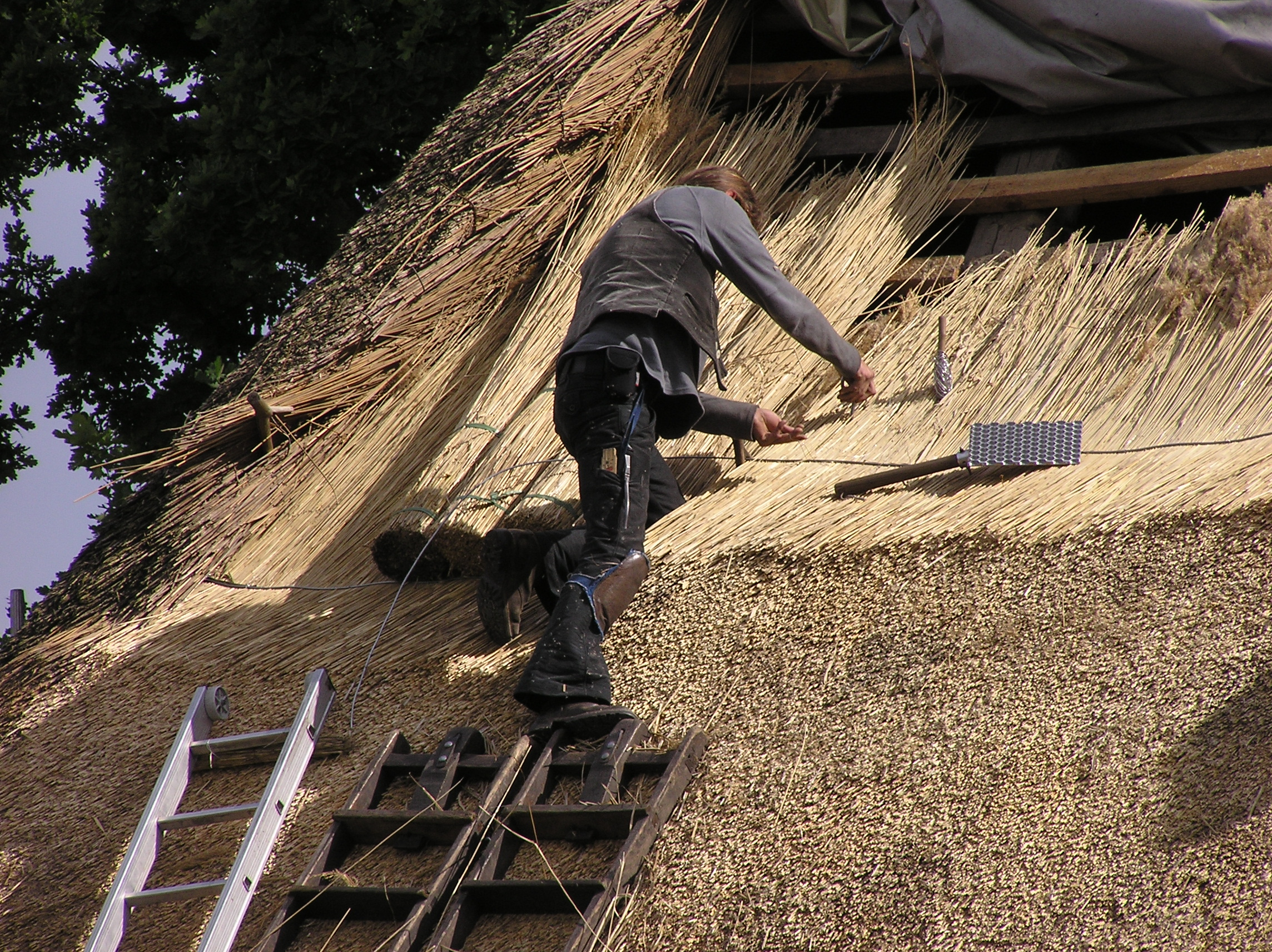 Dachdecker beim decken eines Reetdachhauses in Escheburg.